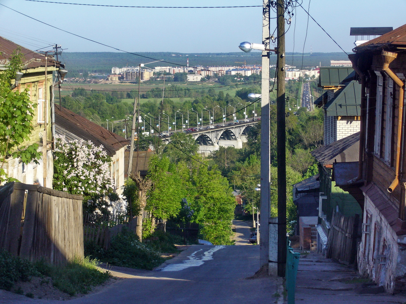 Vladimir